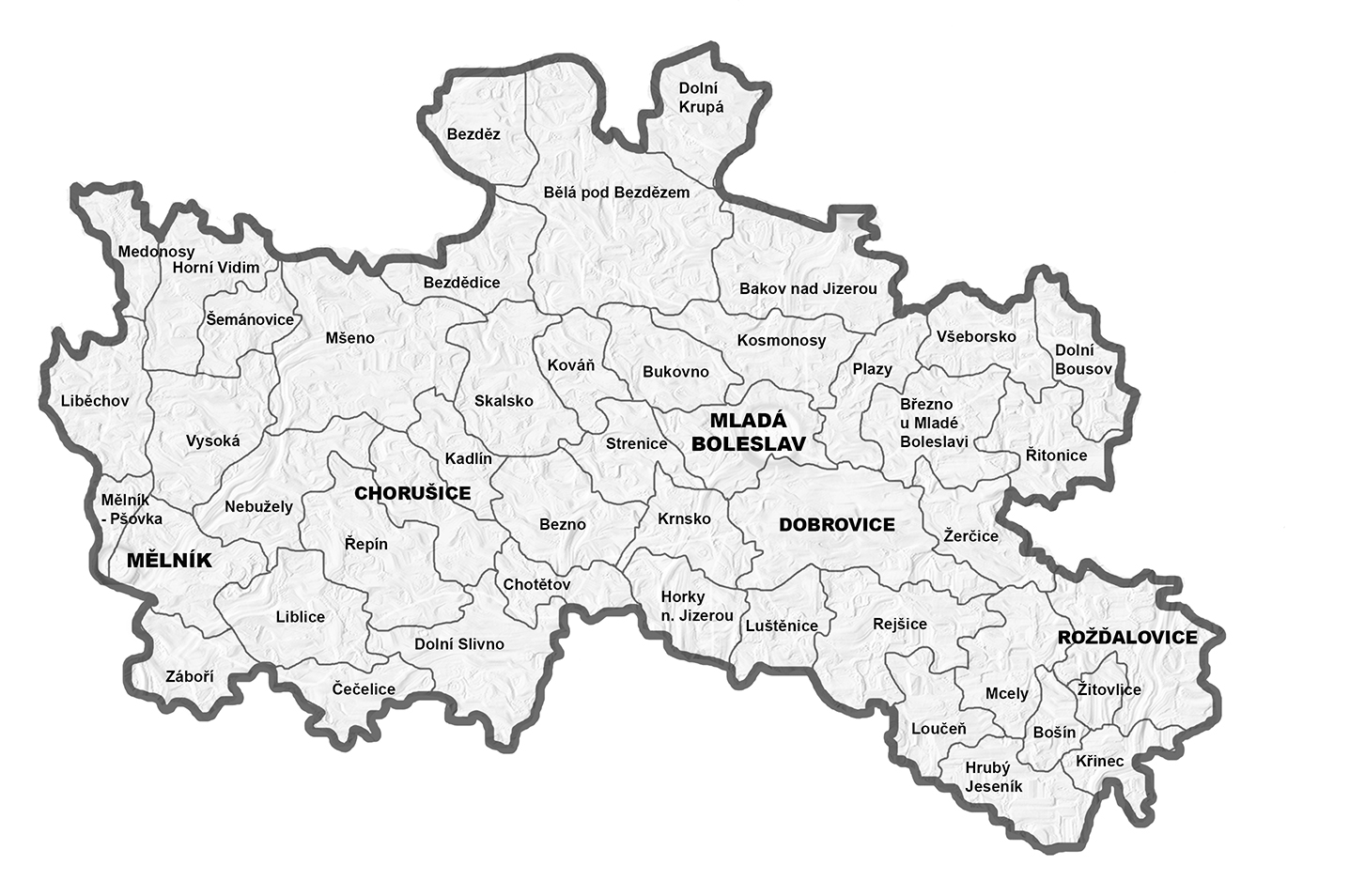 Diecéze litoměřická, mladoboleslavský vikariát - farnosti